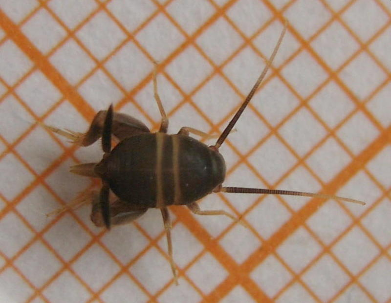 Ameisengrille